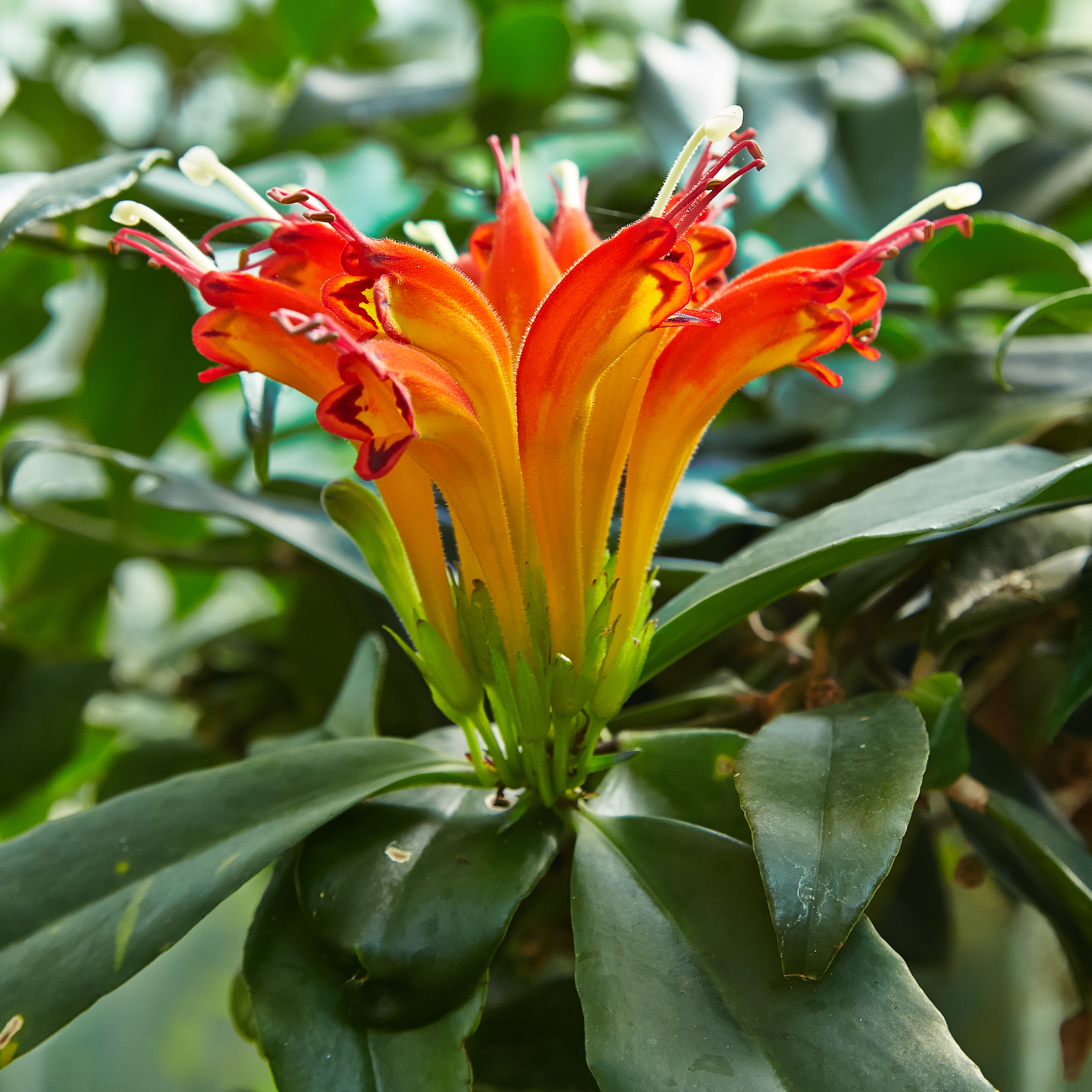 Aeschynanthus speciosus identifierad med hjälp av befintlig skylt i Bergianska trädgården.